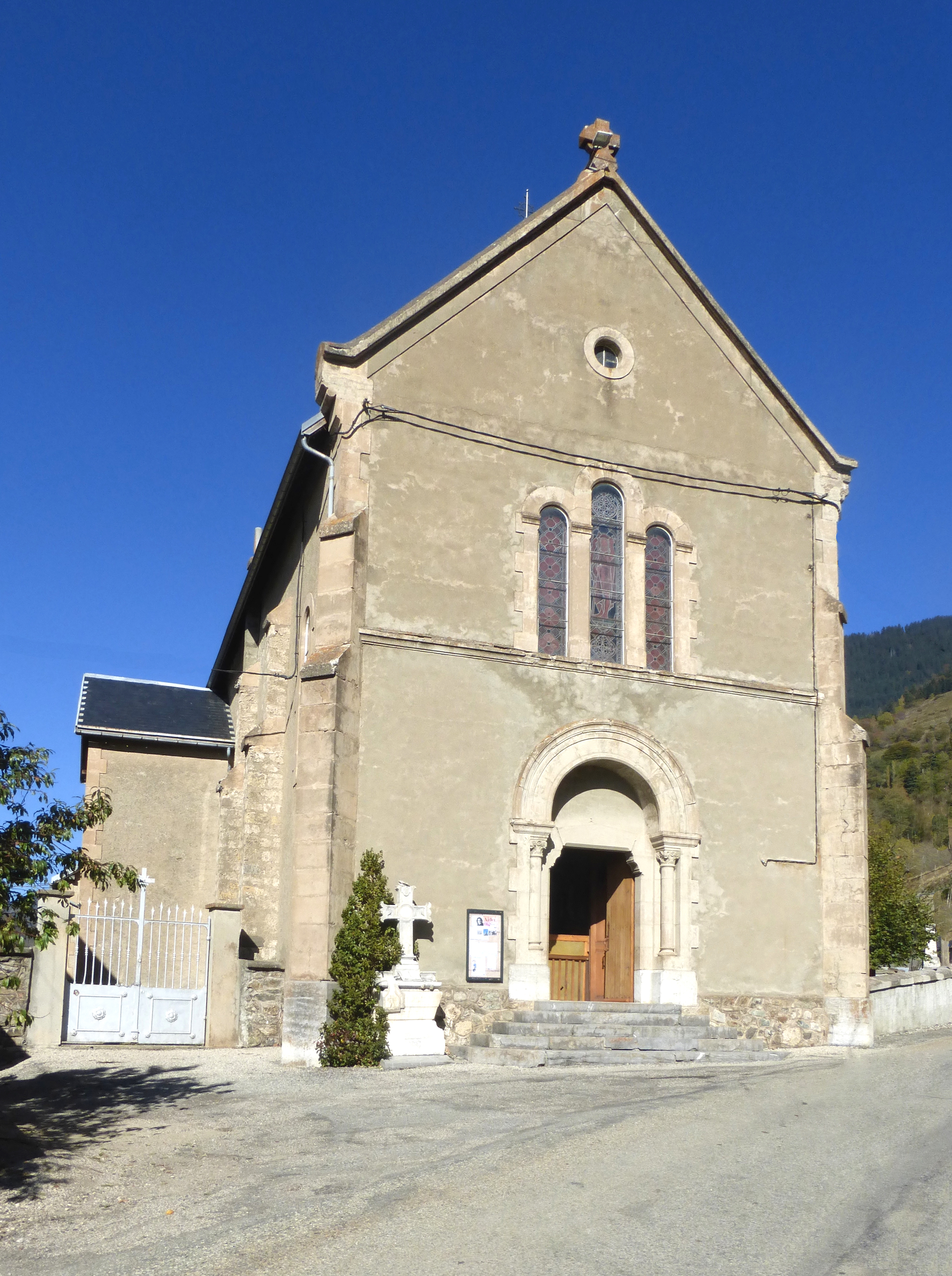 Eglise de Lavaldens à La Ville